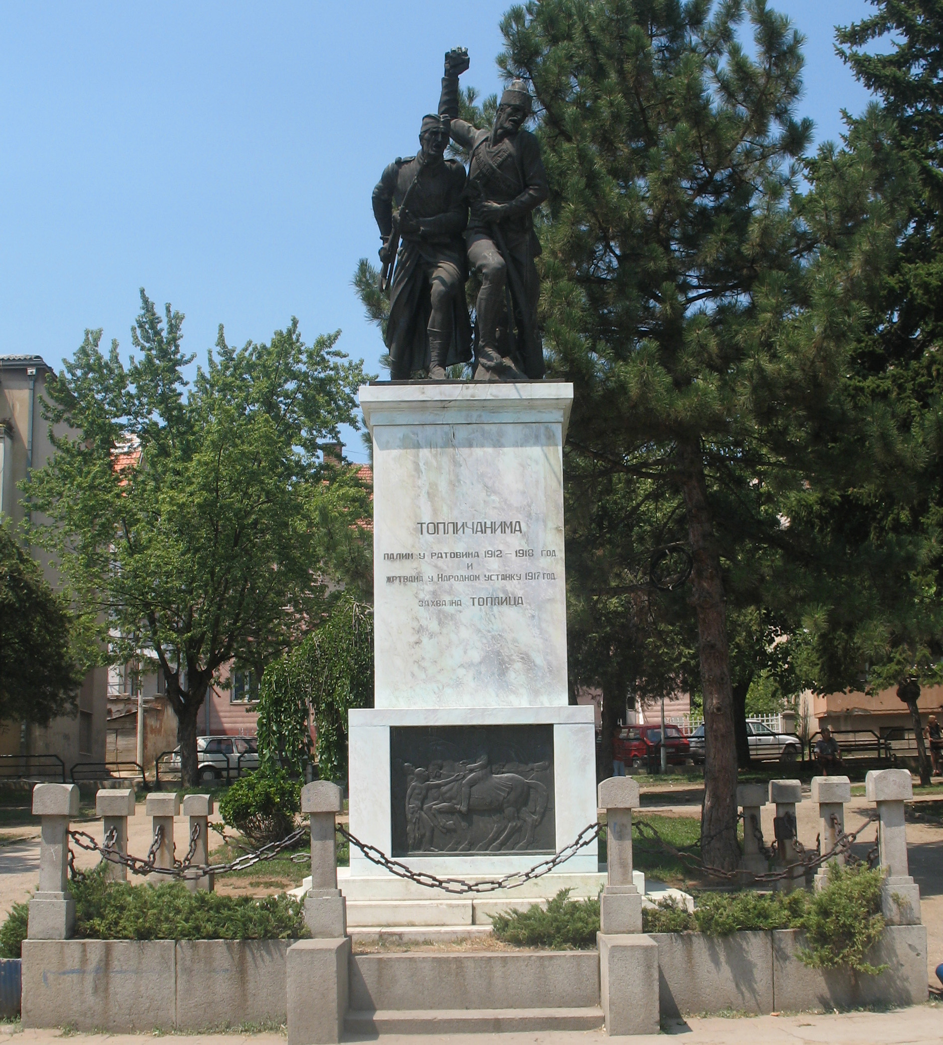 Srpski (latinica): Spomenik palim Topličanima u ratovima 1912-1918 i u narodnom ustanku 1917. godine.